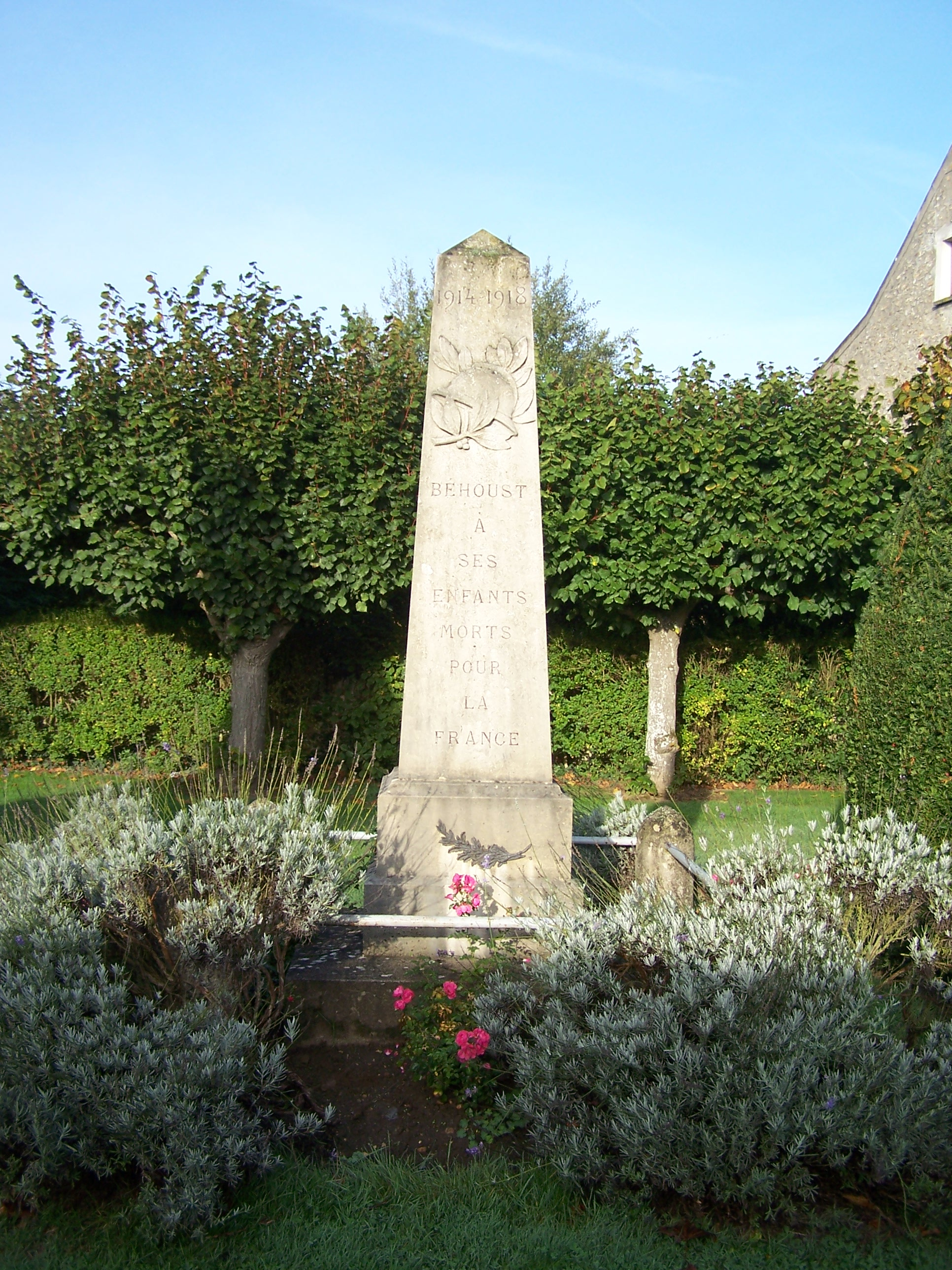 Monument aux morts de Béhoust (Yvelines, France)